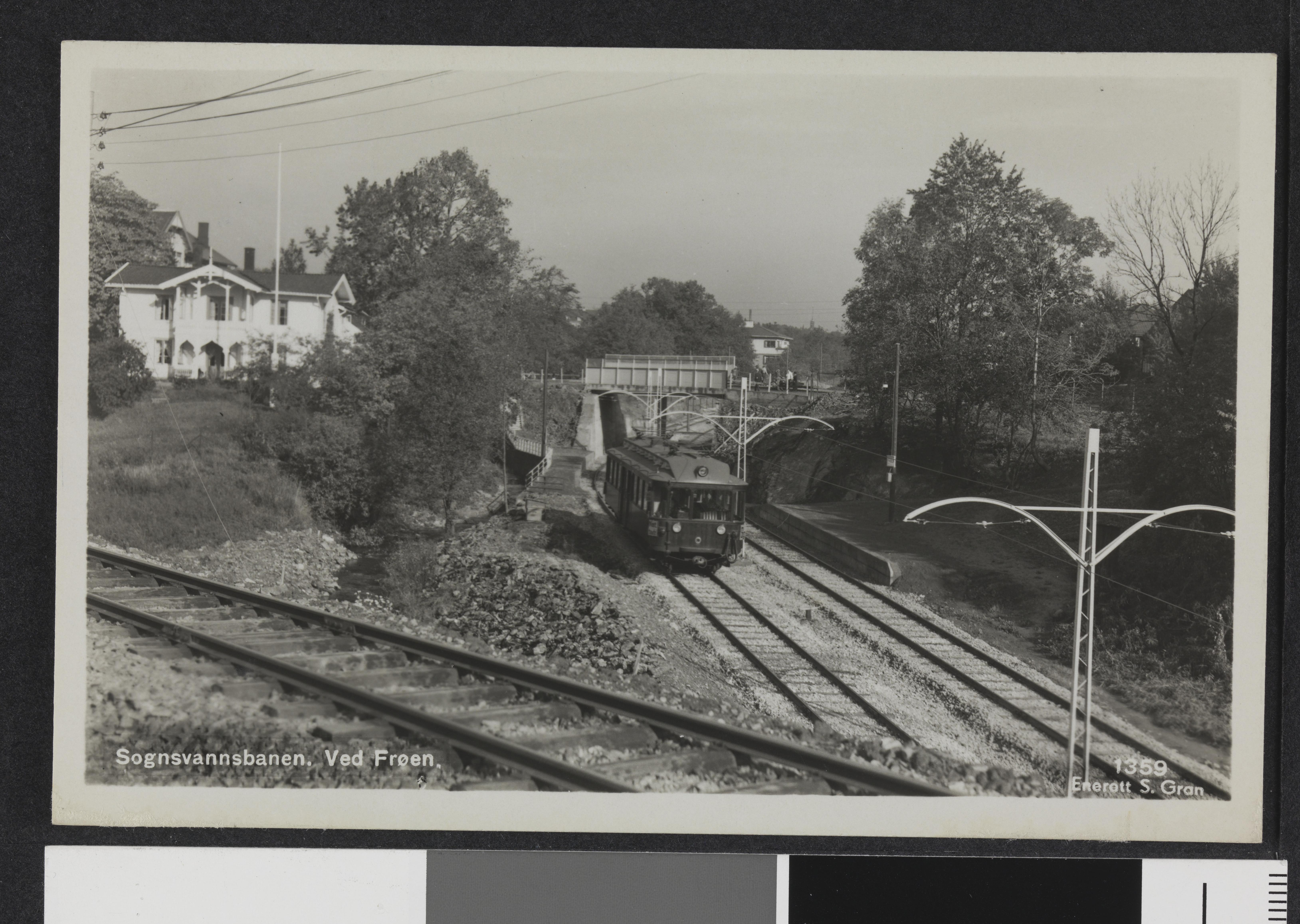 Bildet er hentet fra Nasjonalbibliotekets bildesamling Frøen,Frøen stasjon, Oslo, Oslo